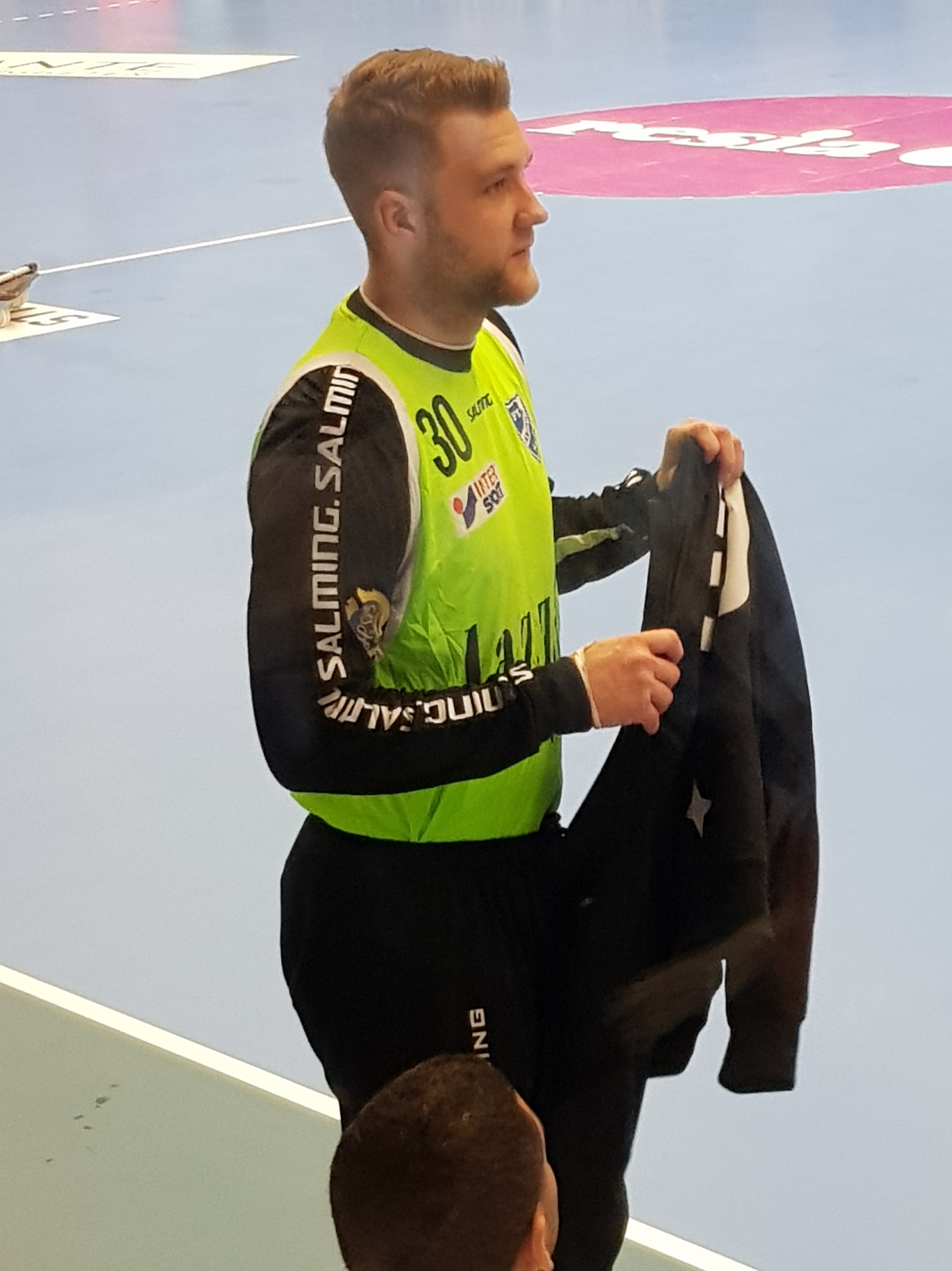 Marcus Holmén IFK Skövde